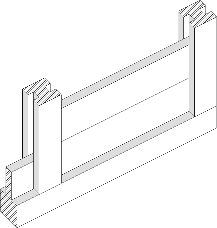 Prinzip der Bohlenwand